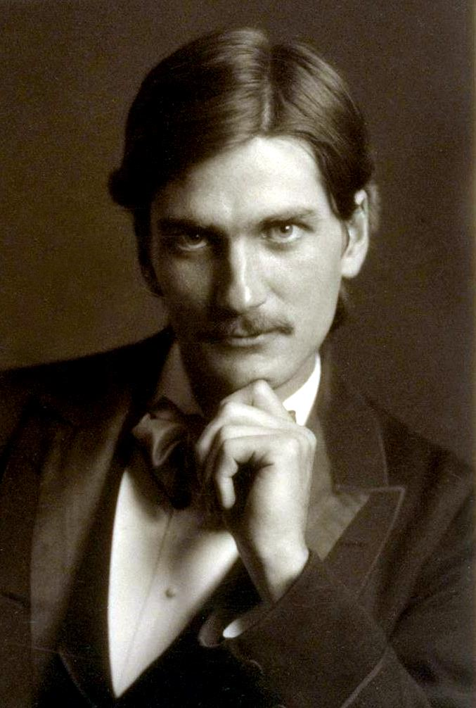 Charles Augustus Keeler